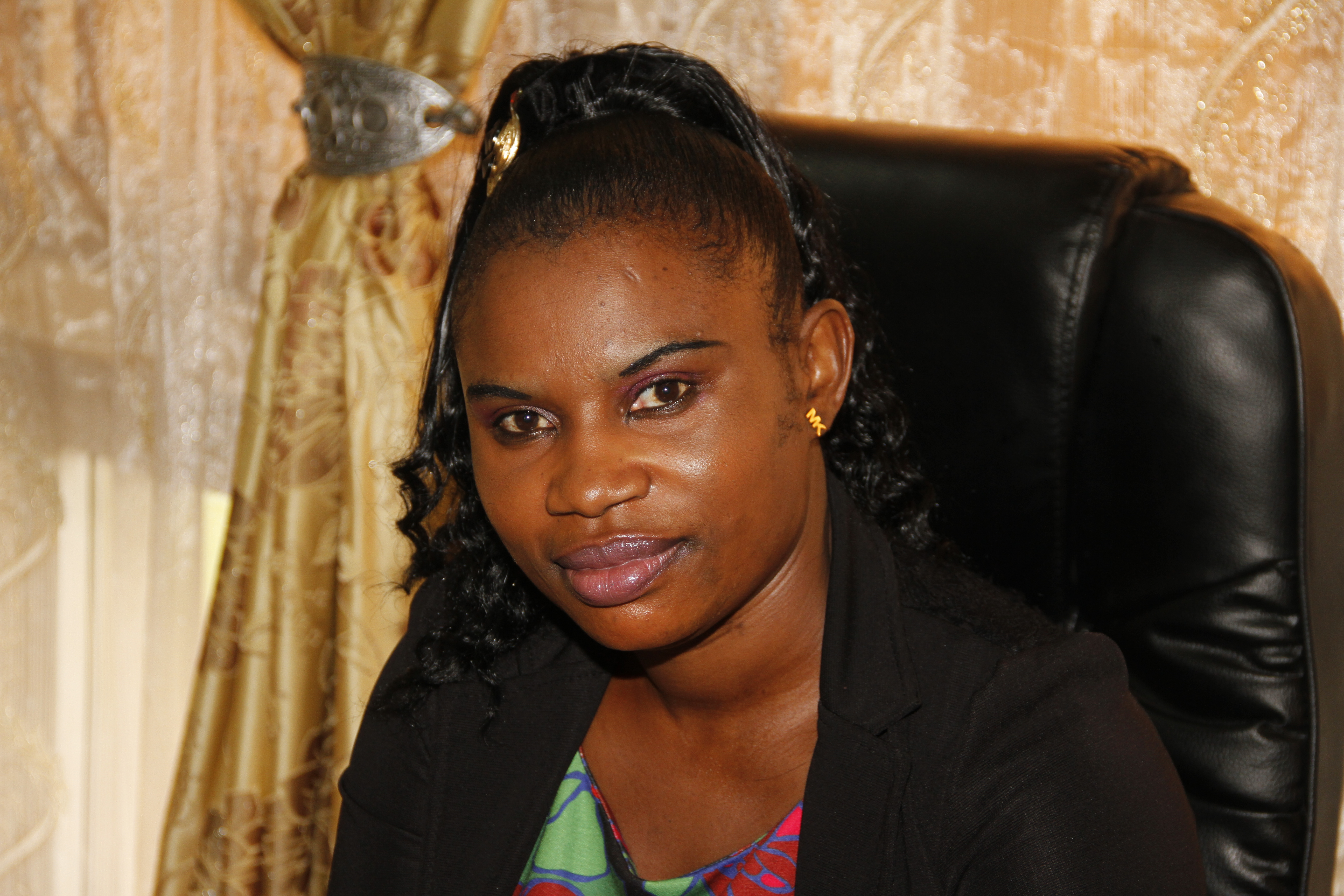 L'écrivaine et diplomate Carine Pilo dans son bureau au Ministère des relations extérieures du Cameroun